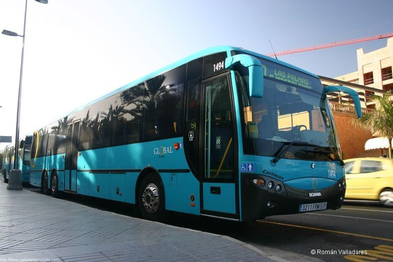 Global busdiensten op het vakantie eiland Gran Canaria Global bus services on the holiday island of Gran Canaria Global Busdienstleistungen auf der Ferieninsel Gran Canaria Global servicios de autobús en la isla turística de Gran Canaria